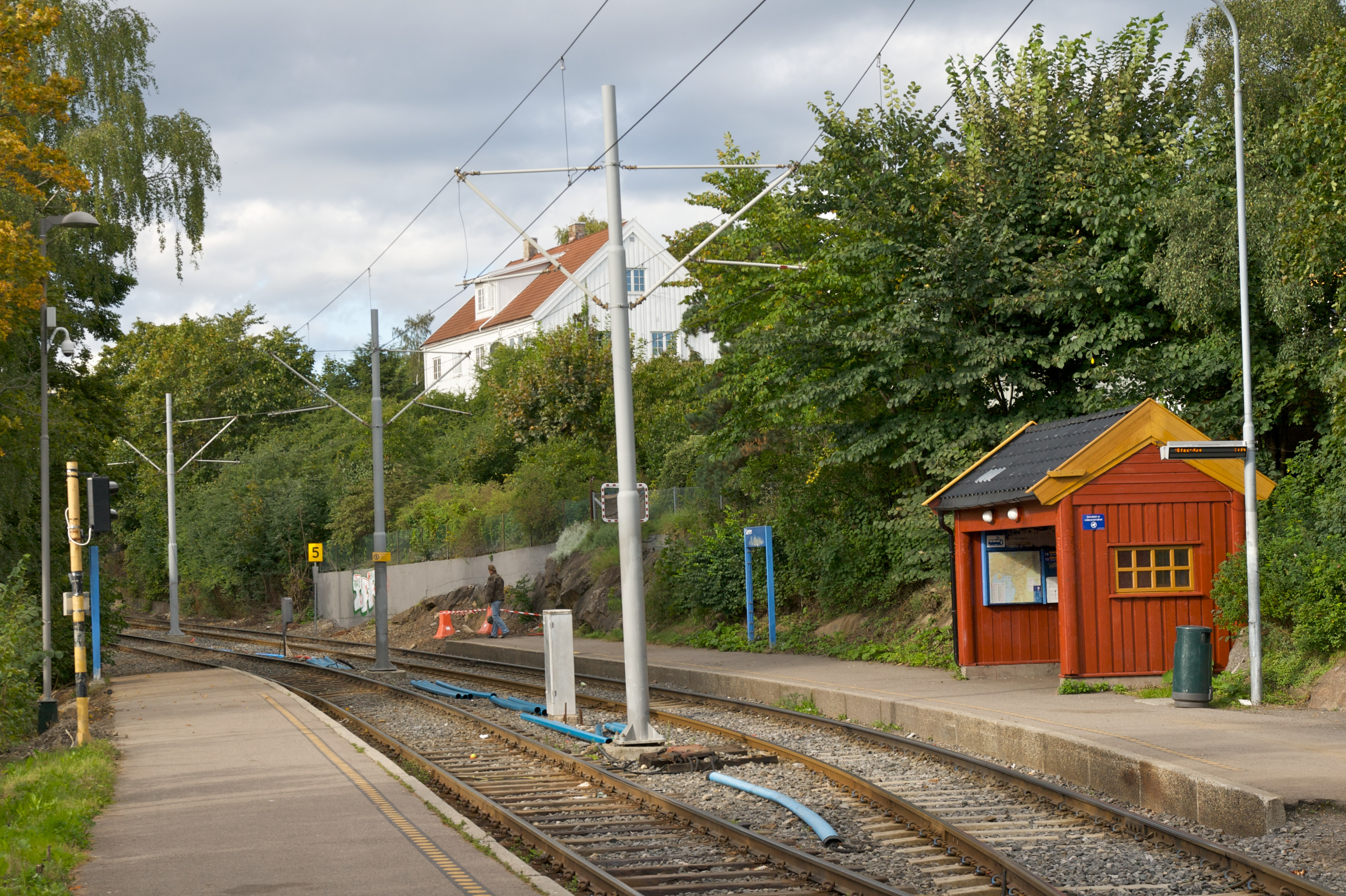 Sæter holdeplass på Ekebergbanen.